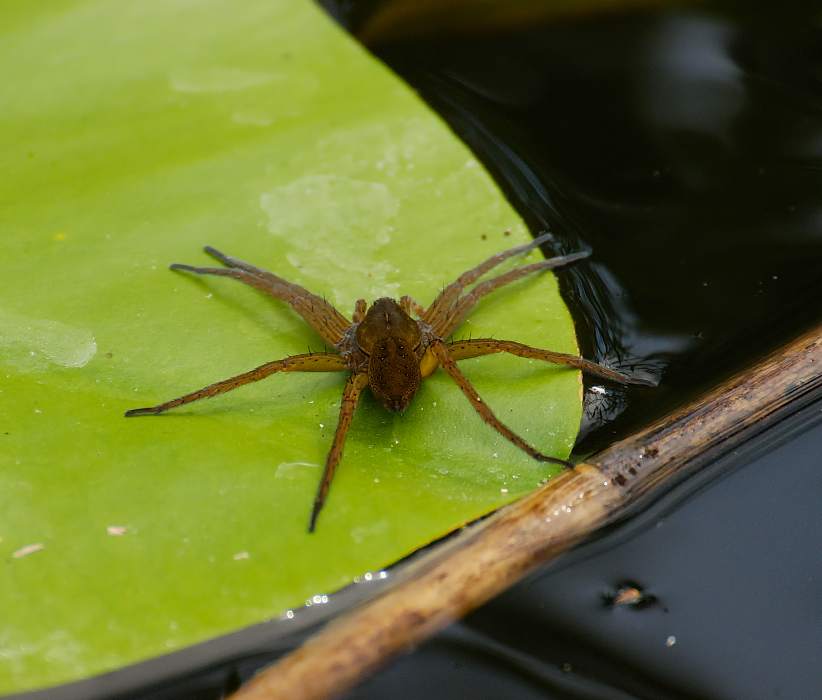 Raubspinne - Dolomedes plantarius, Weibchen. Aufgenommen auf dem Sägersee in Godendorfer Papiermühle, Mecklenburg-Vorpommern, Deutschland.